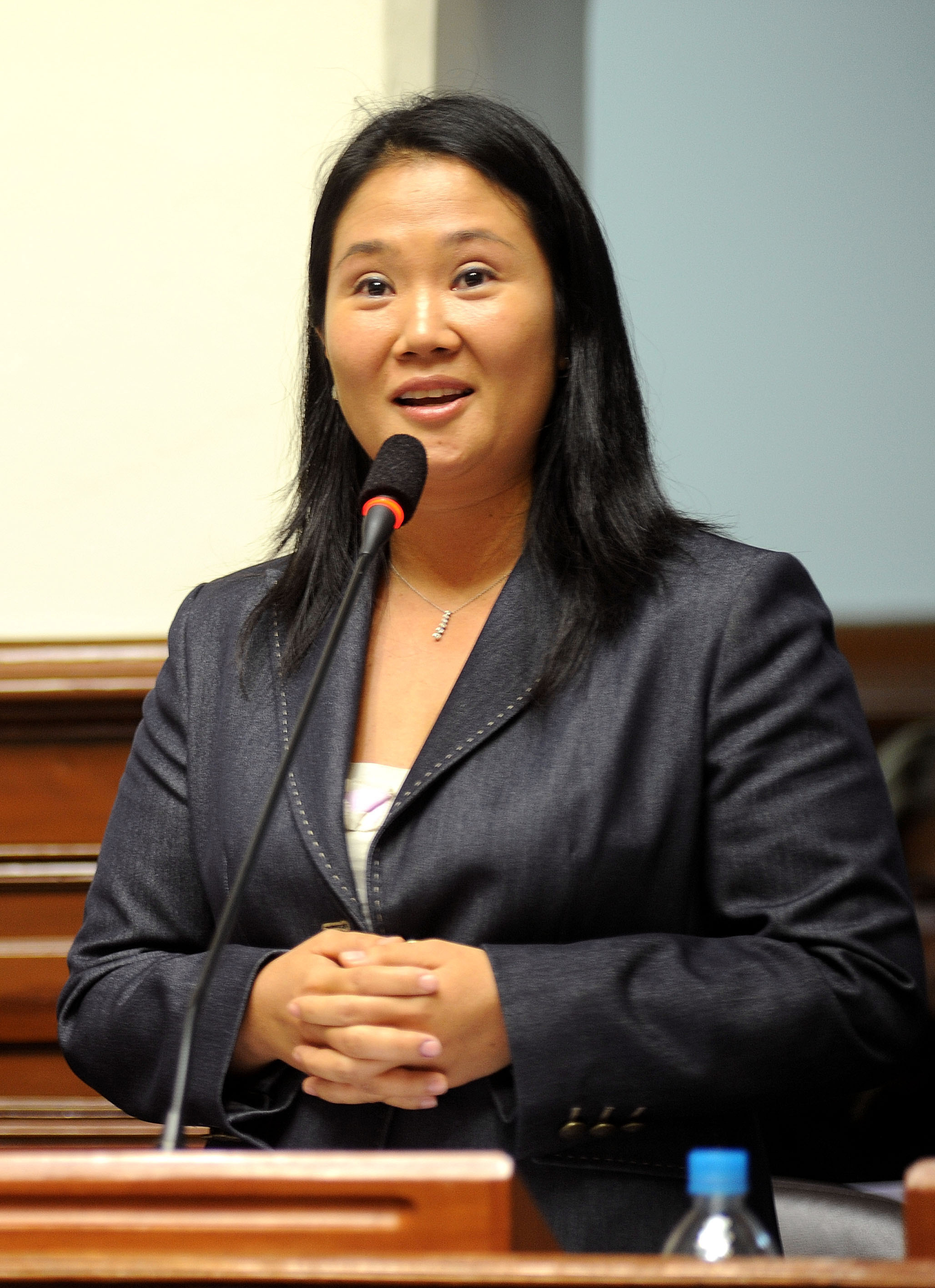 La legisladora Keiko Fujimori fija su posición en el debate parlamentario realizado esta tarde por el Pleno.